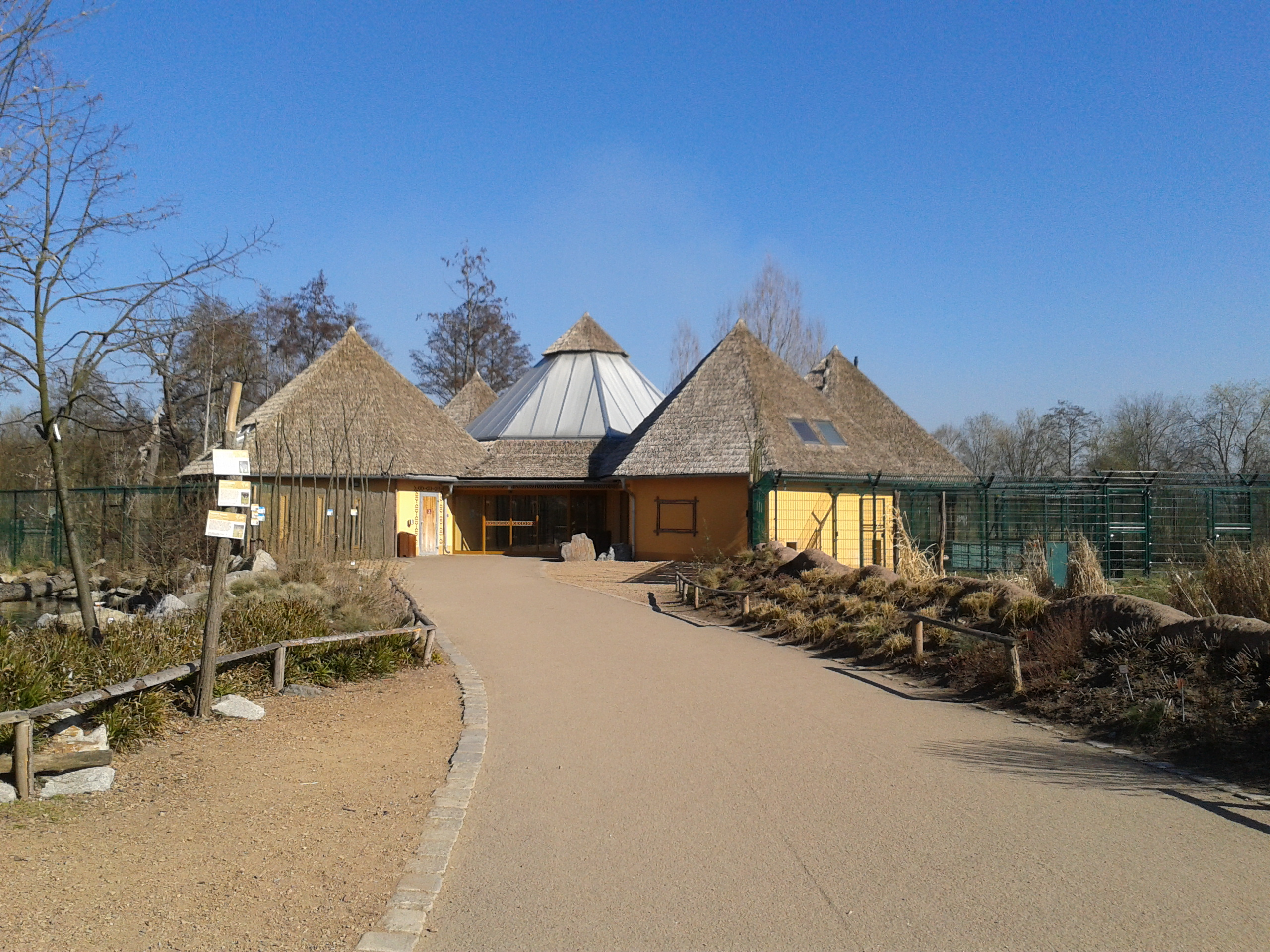 Africká a asijská expozice Zoologické zahrady Plzeň